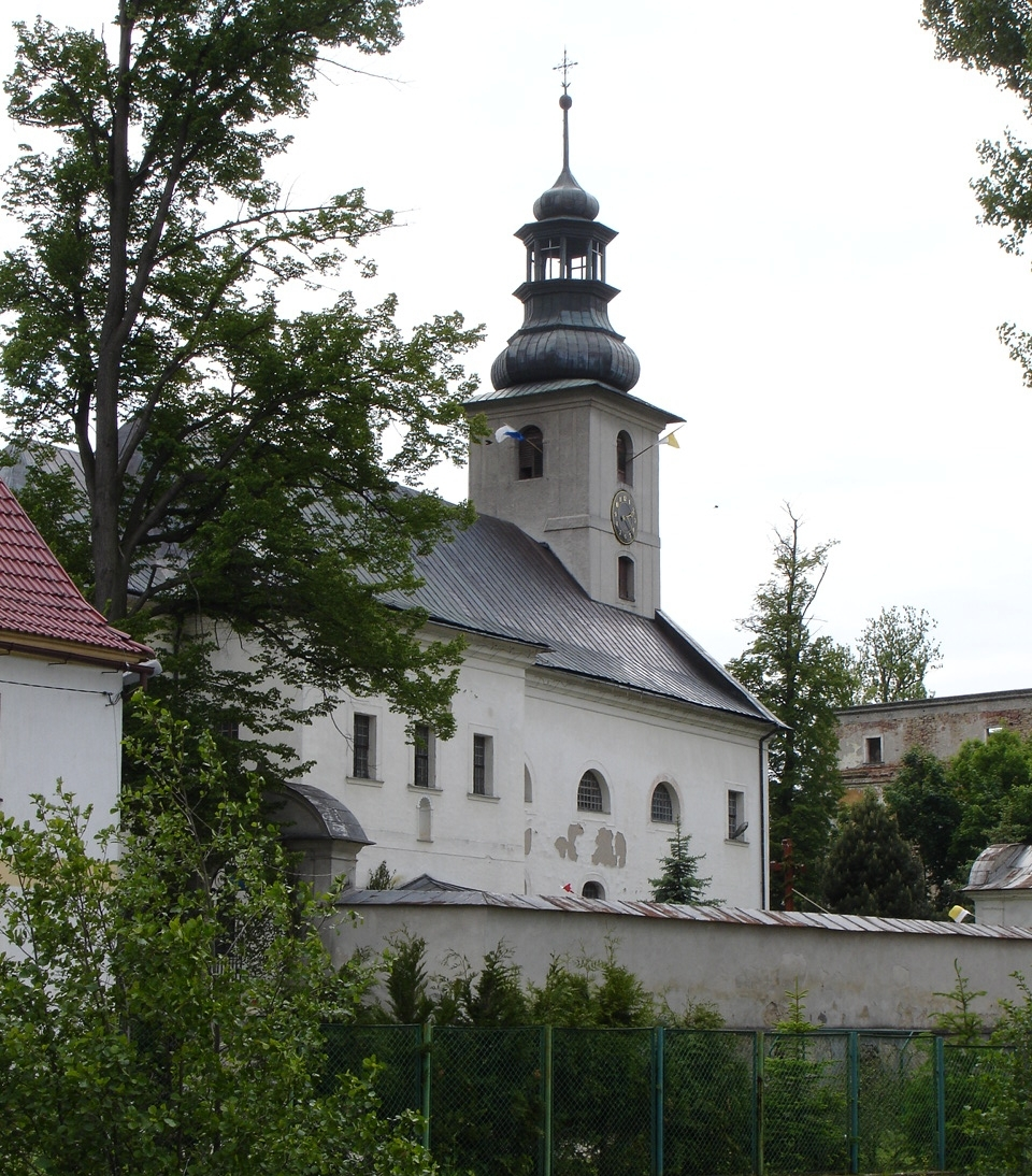 Wilkanów (Wölfelsdorf), Kath. Pfarrkirche St. Georg, im Hintergrund Schloss Wölfelsdorf der Grafen Althann